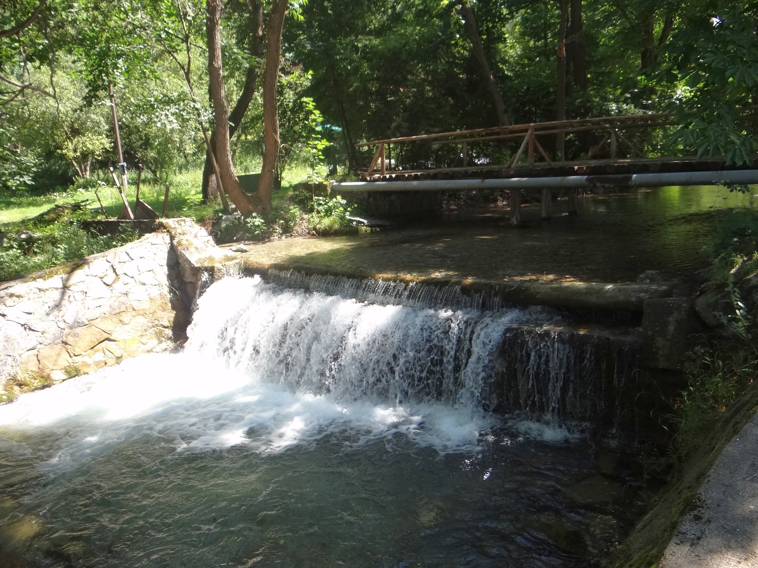 Blatnica